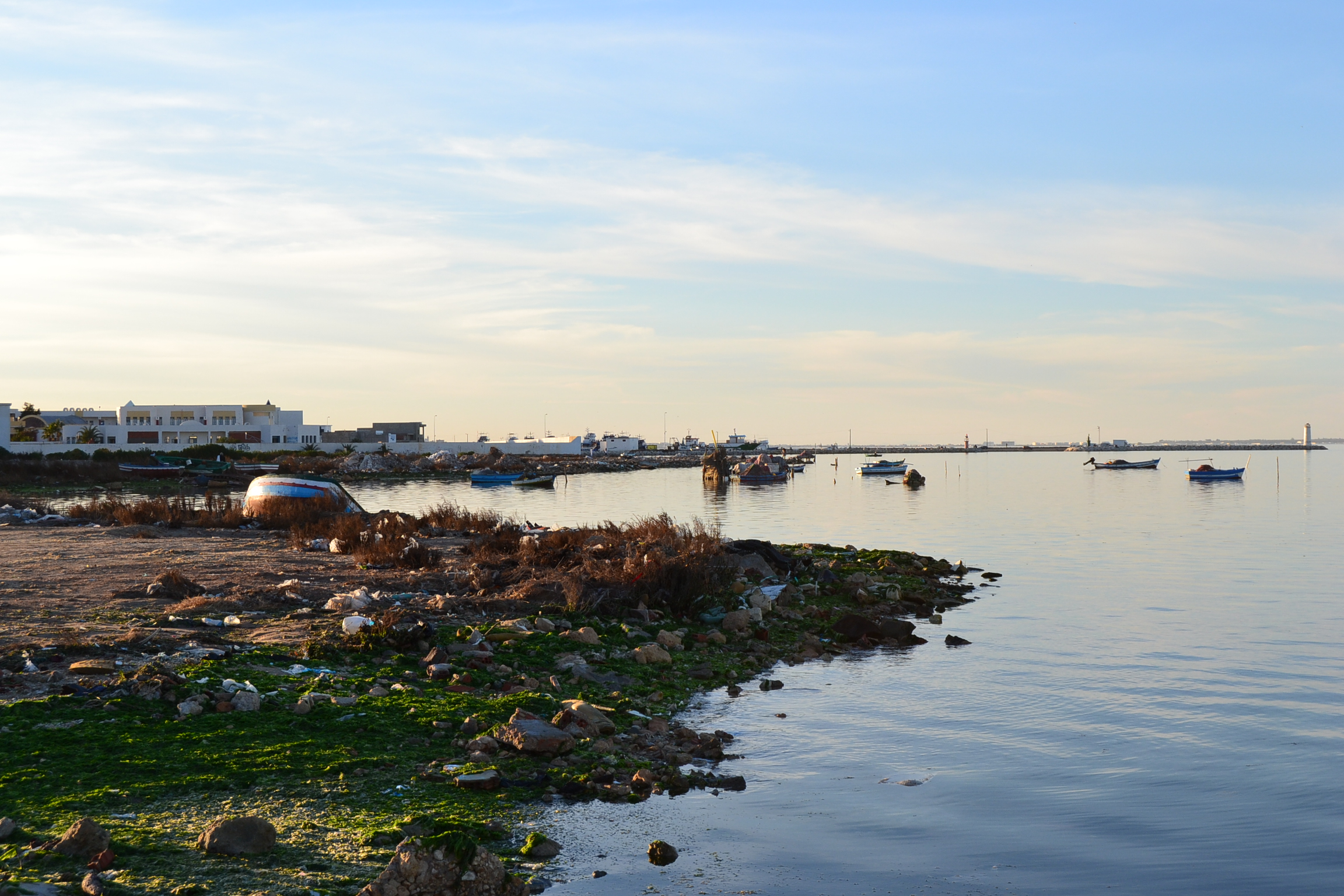 Pollution de la lithosphère dans la zone du golfe de Monastir (à Sayada) This photograph was taken with a Nikon D3100